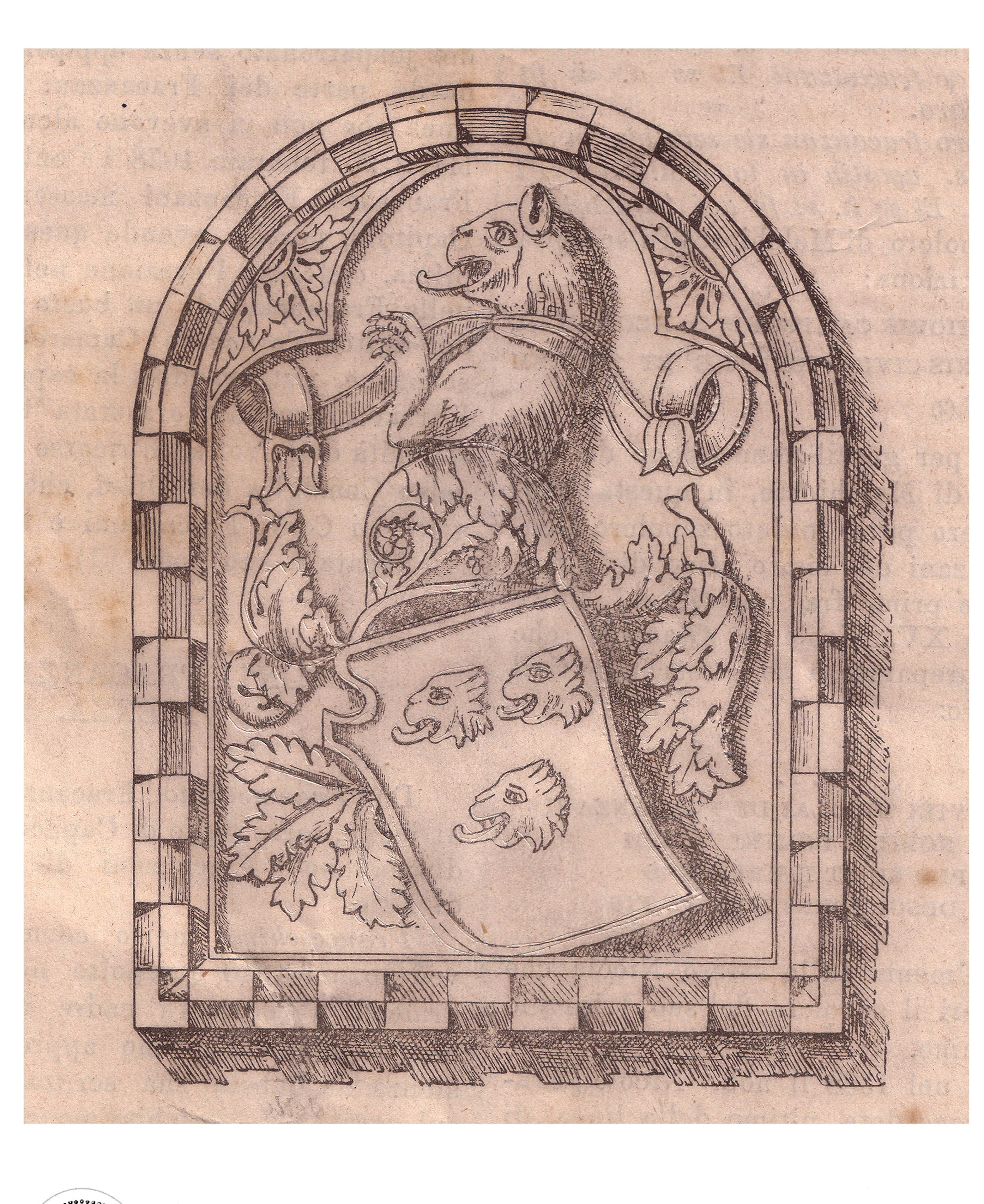 Arma conti Fracanzani all'interno della Cattedrale di Vicenza (sec. XV)